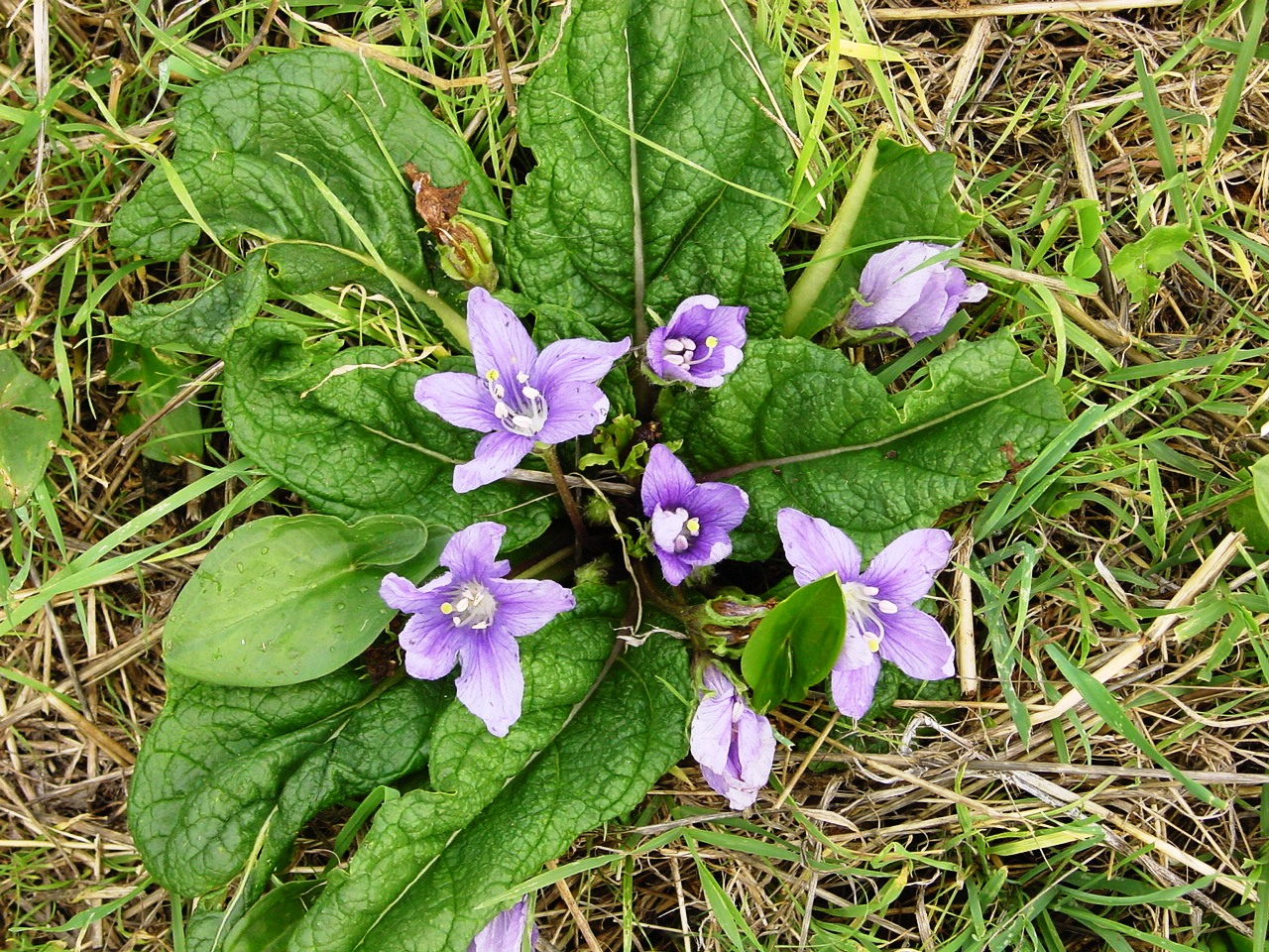 Mandragora autumnalis Bertol